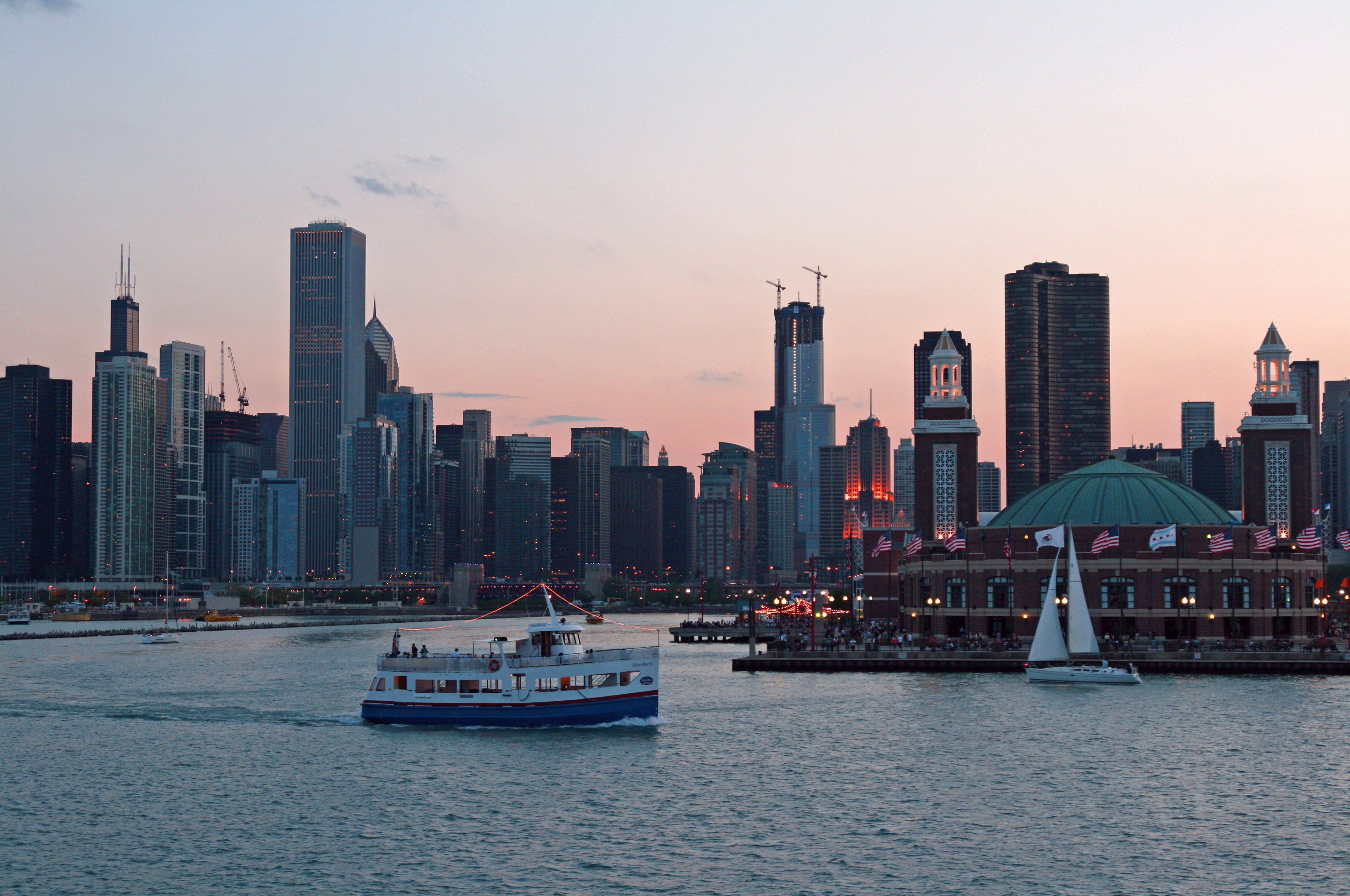 ... evening skyline